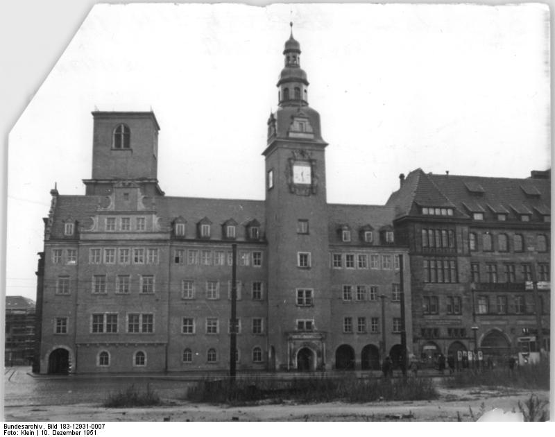 Chemnitz, Rathaus Illus Klein 10.12.1951 Bauplatz DDR. In Westdeutschland werden hauptsächlich Kasernen gebaut. In der DDR werden durch unseren Fünfjahrplan neue Industriewerke errichtet und für Wohnungen, Kulturhäuser, Krankenhäuser, Ambulaterien u.a. 4160 Millionen DM ausgegeben. 10, 1 Millionen qm Wohnfläche werden in 53 Städten bis 1955 wiederhergestellt oder neugebaut. UBz: Der Neubau des Rathauses in Karl-Marx-Stadt.